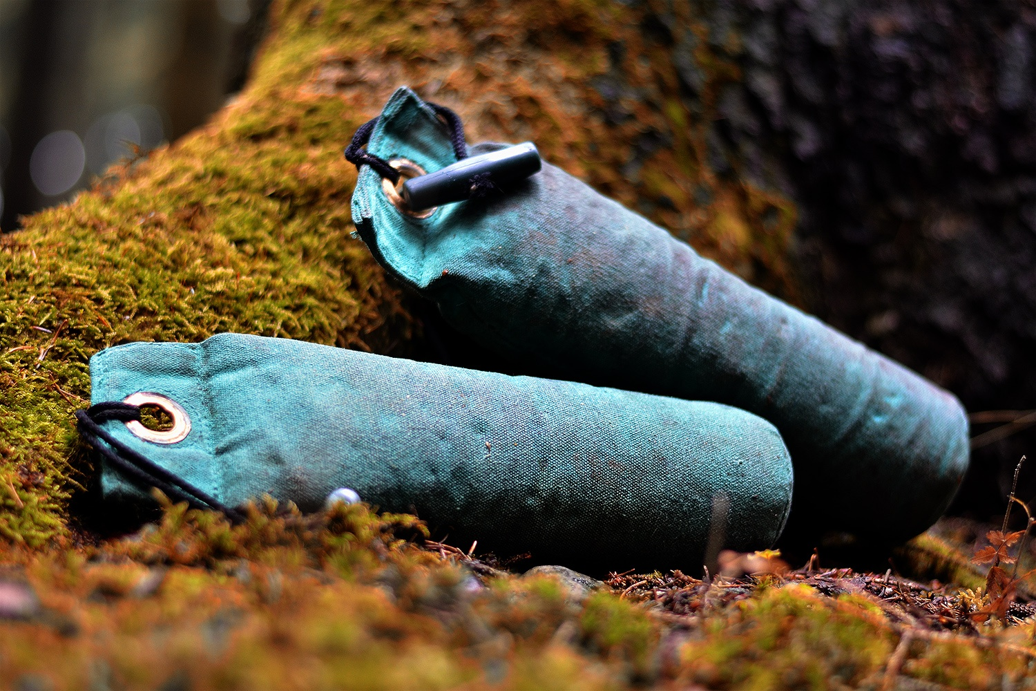 Dummy / Dummies im Wald